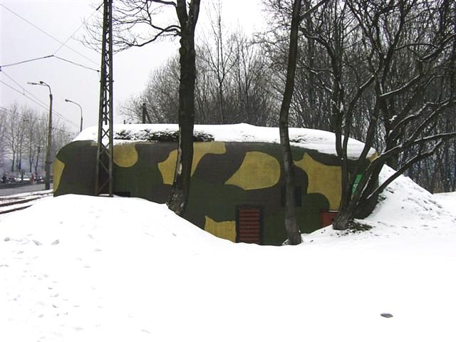 Schron w punkcie oporu Łagiewniki.